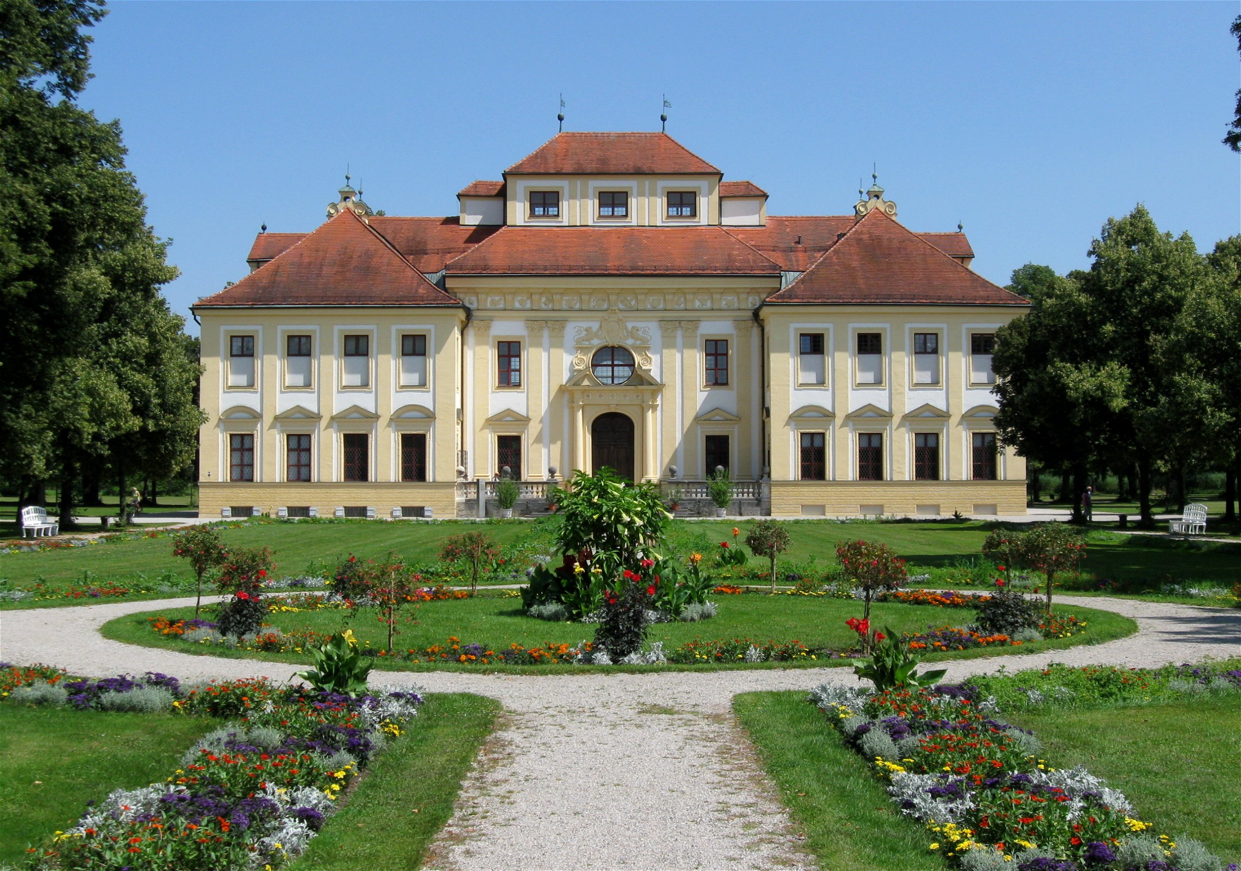 Schloss Lustheim, Gartenseite